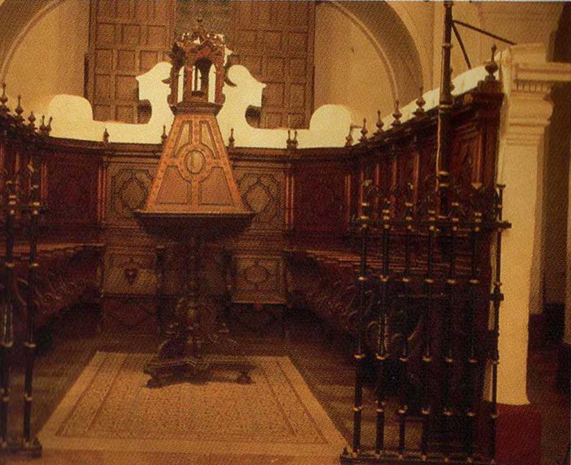 Coro de la Iglesia. Vista de la sillería y, en el centro, el facistol.